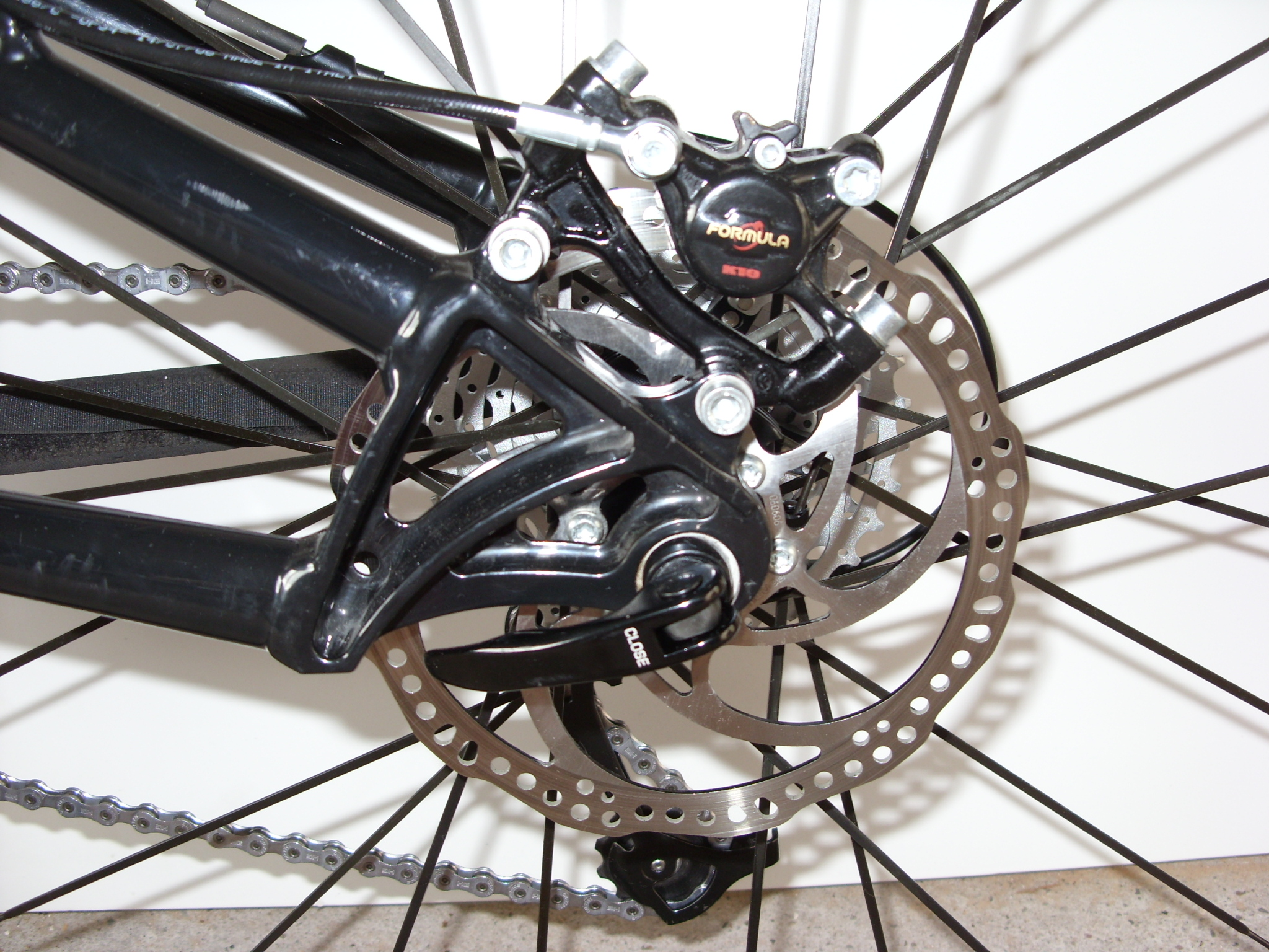 Scheibenbremse Hinterrad: Formula. Oro K 18